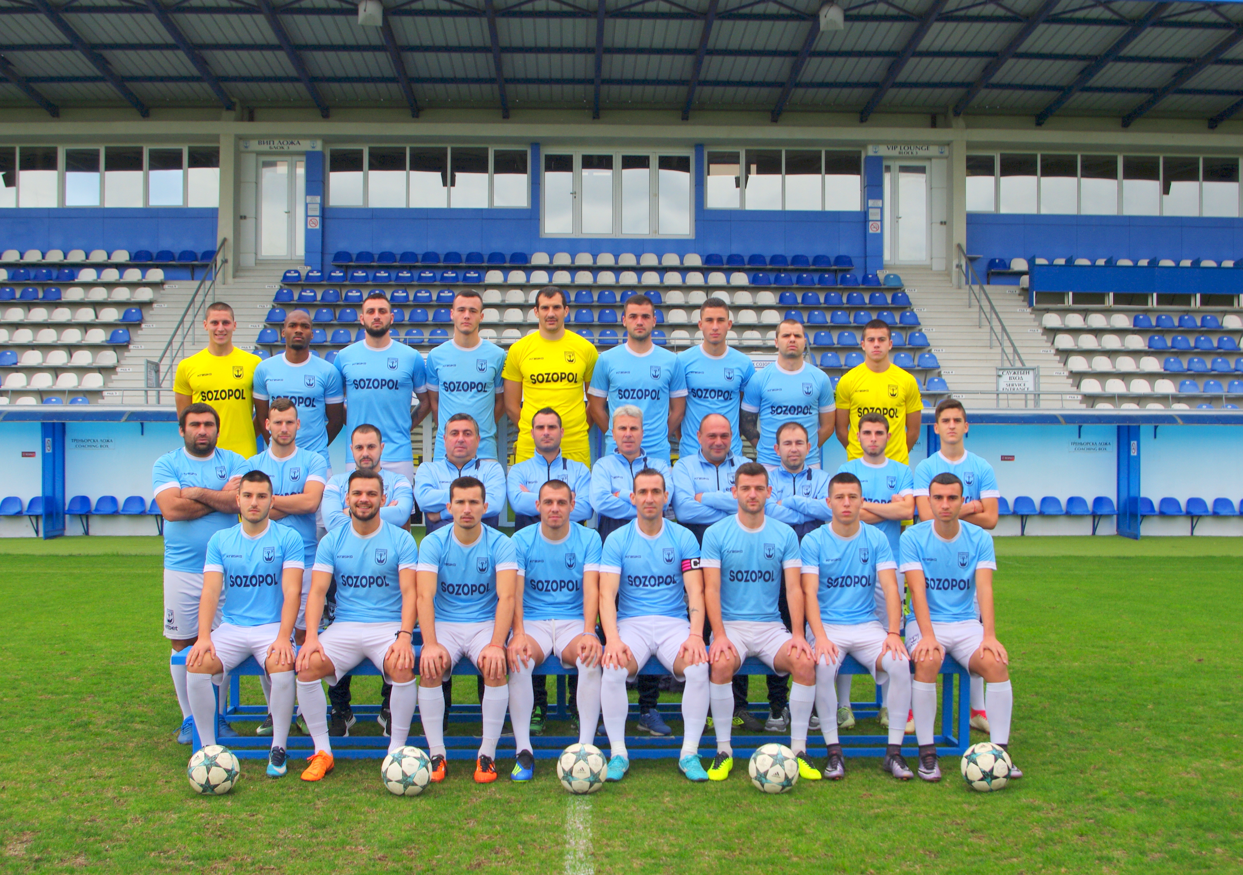 Созопол сезон 2018-2019 1